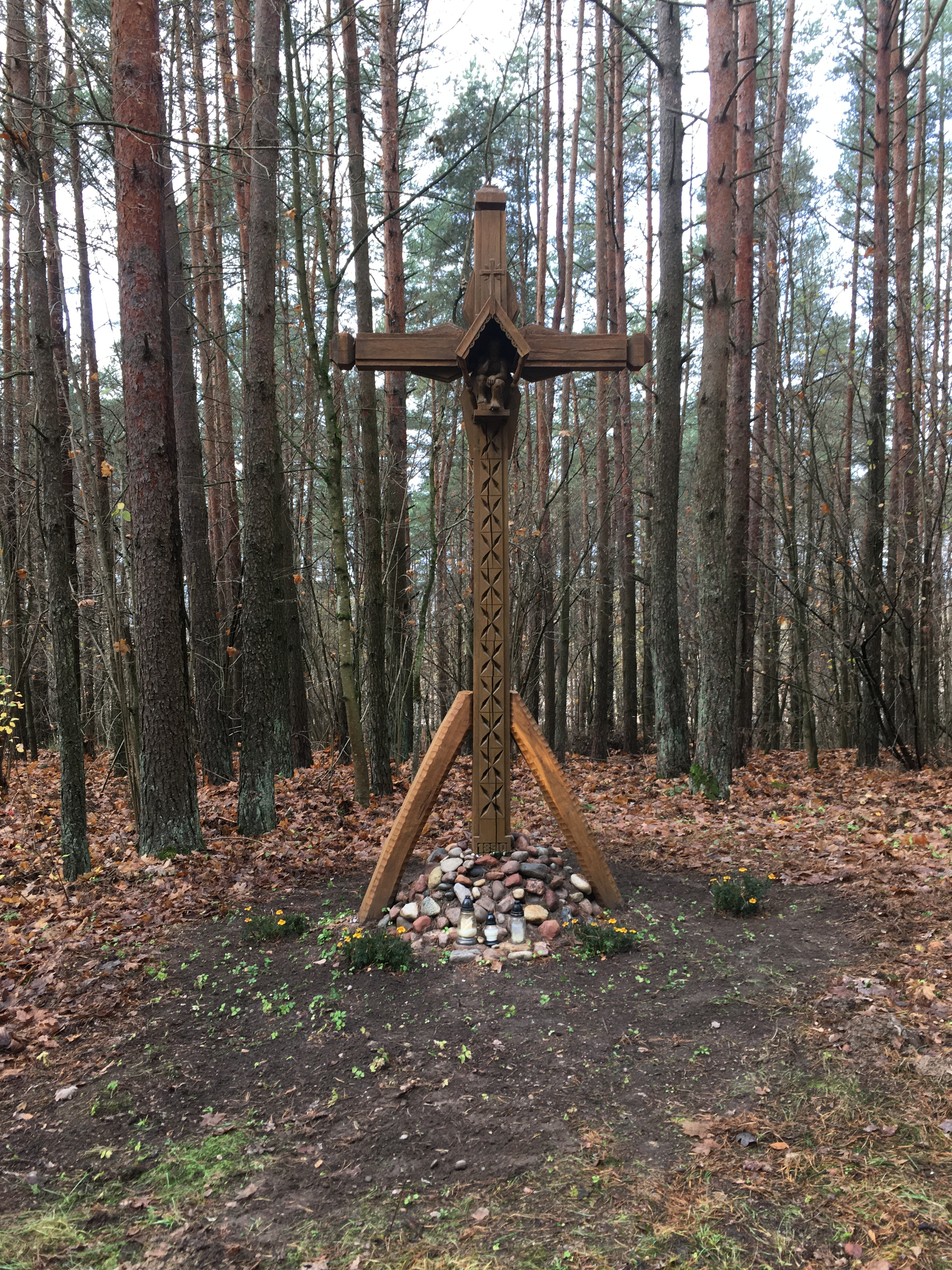 Smukučių kryžius